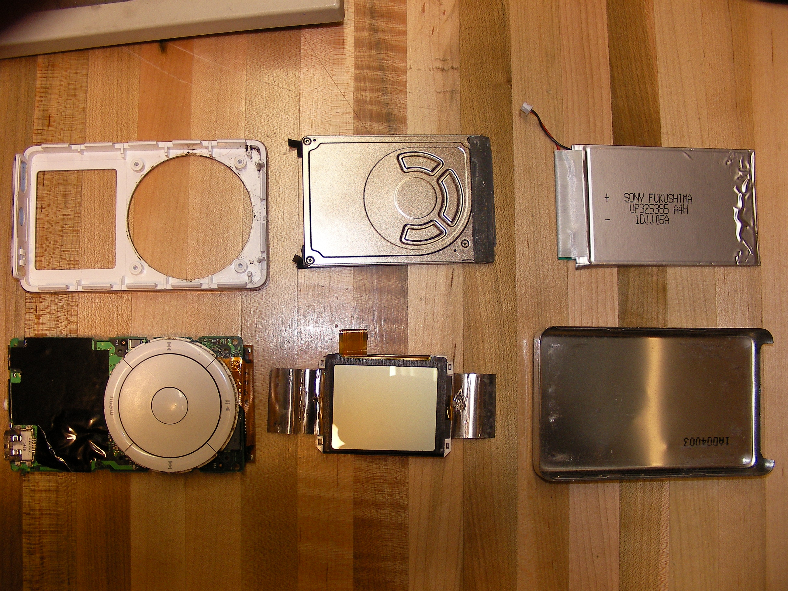 iPod 1G desasembled